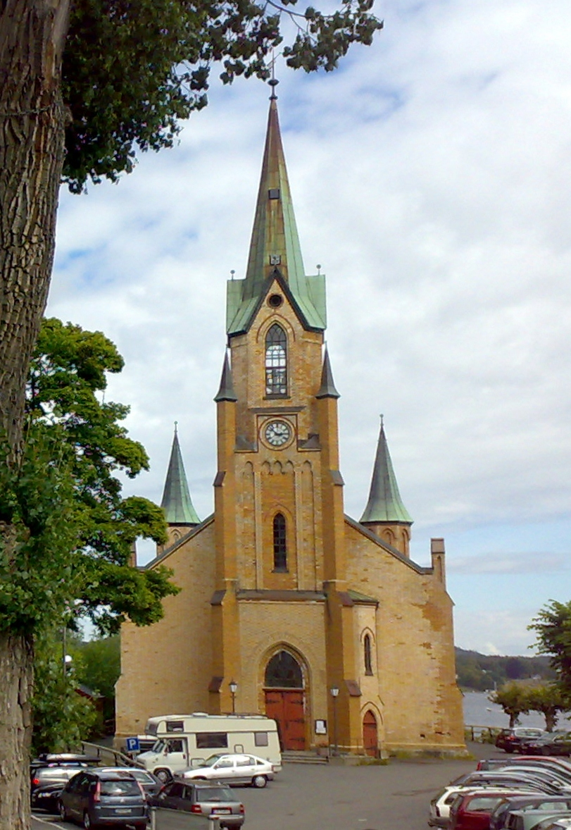 Kragerø church, city of Kragerø (Telemark county), Norway